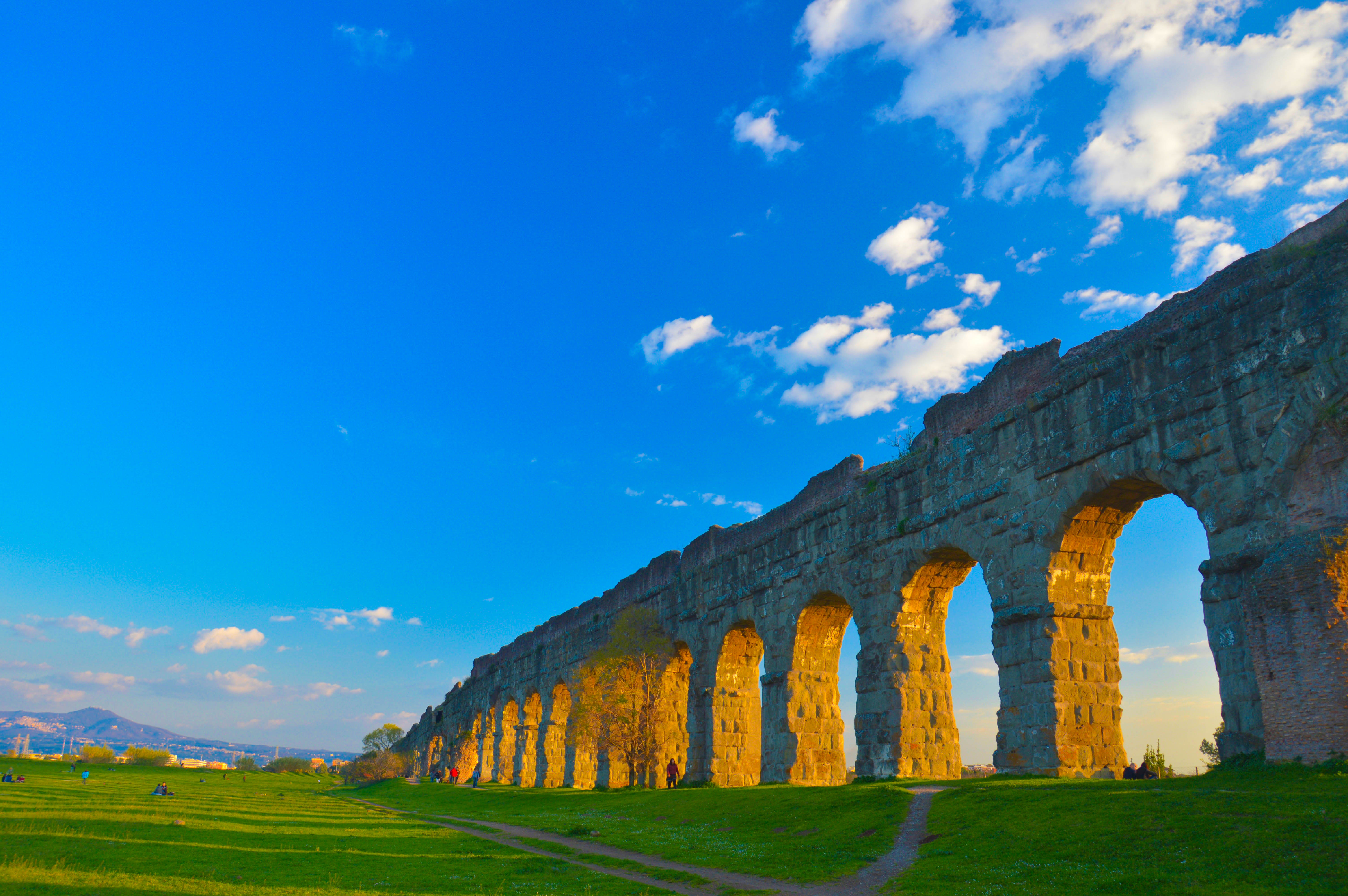 Acquedotto Alessandrino This is a photo of a monument which is part of cultural heritage of Italy.